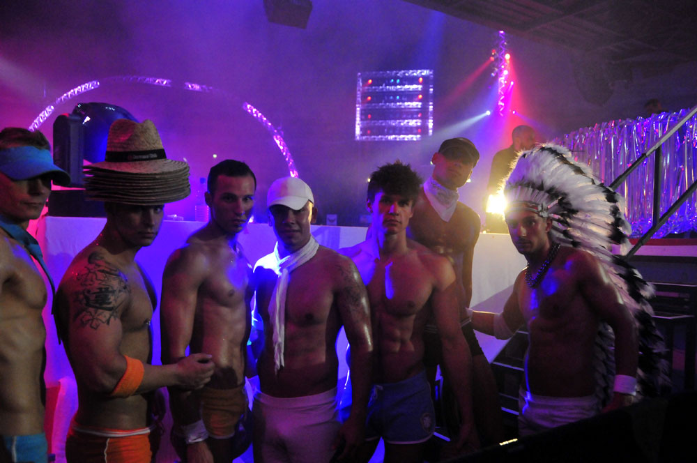 Colour Cologne, Köln